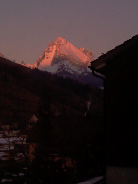 Mount Altmann in Toggenburg, Switzerland in the evening sun - Monto Altmann en Togenburgo, Svislando en vespersuno